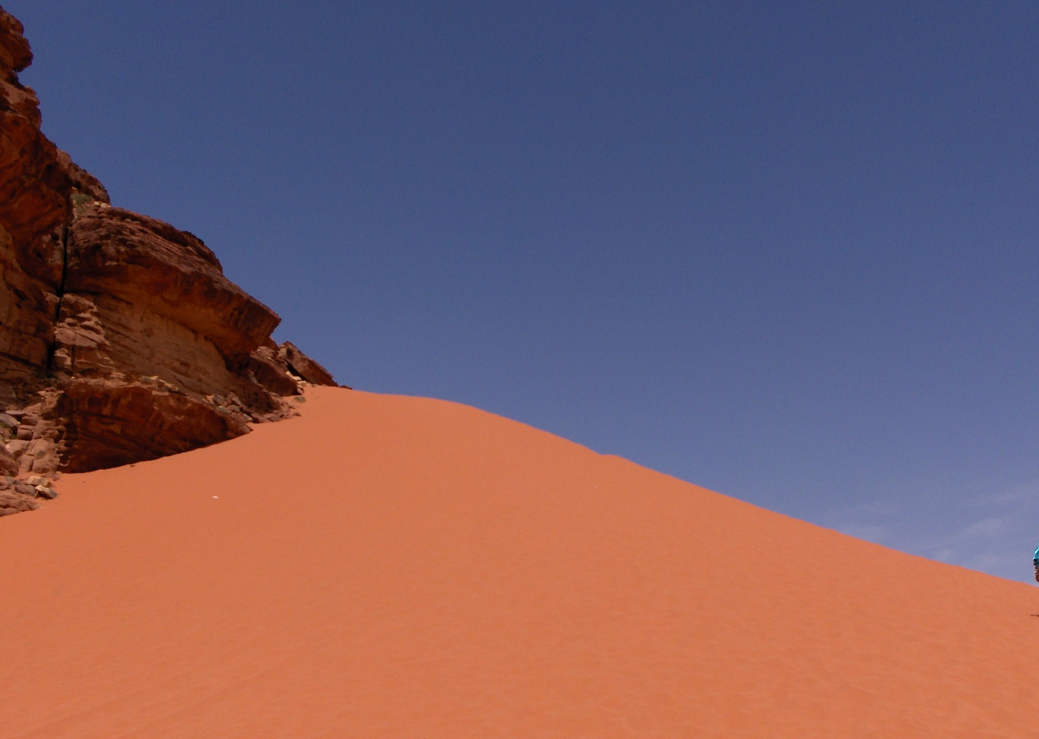 Duna di sabbia nel Wadi Rum